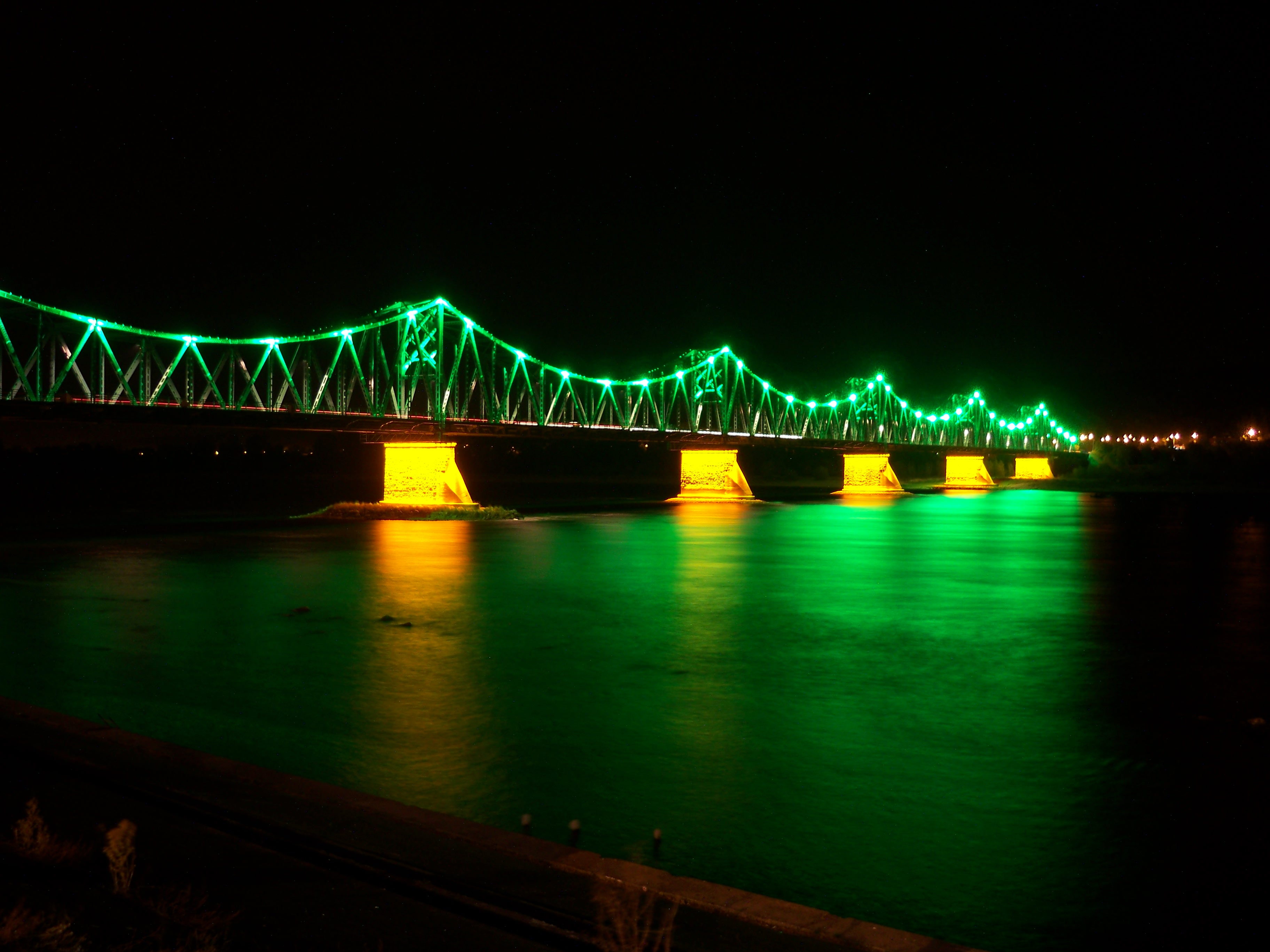 Włocławski most na Wiśle (2009 r.)